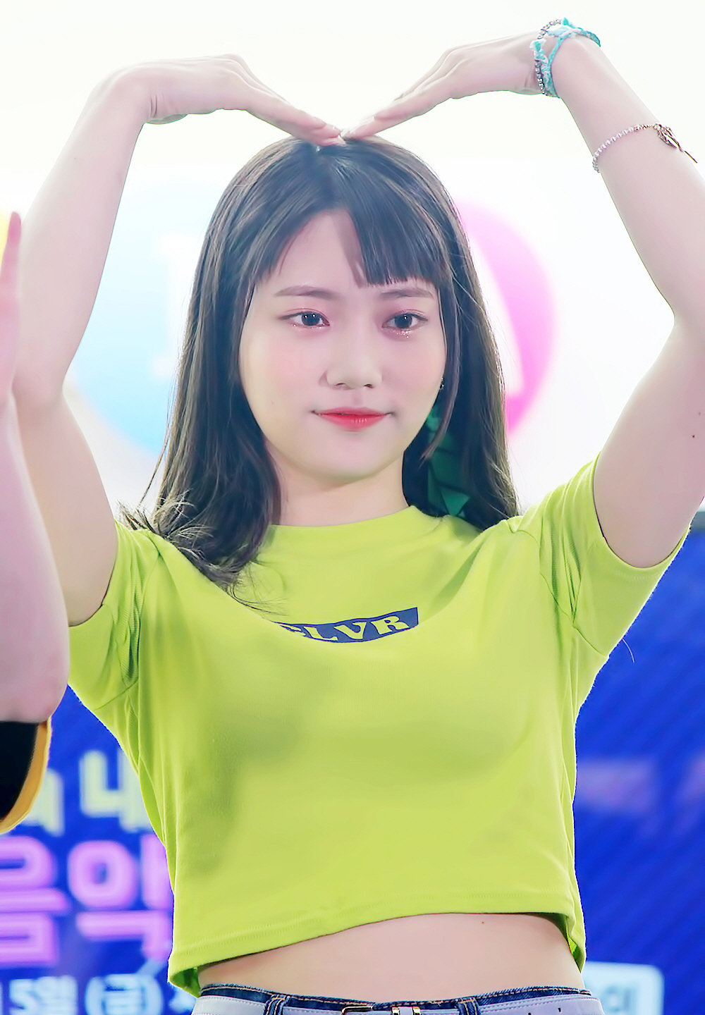 170505 다이아 음악회 직찍